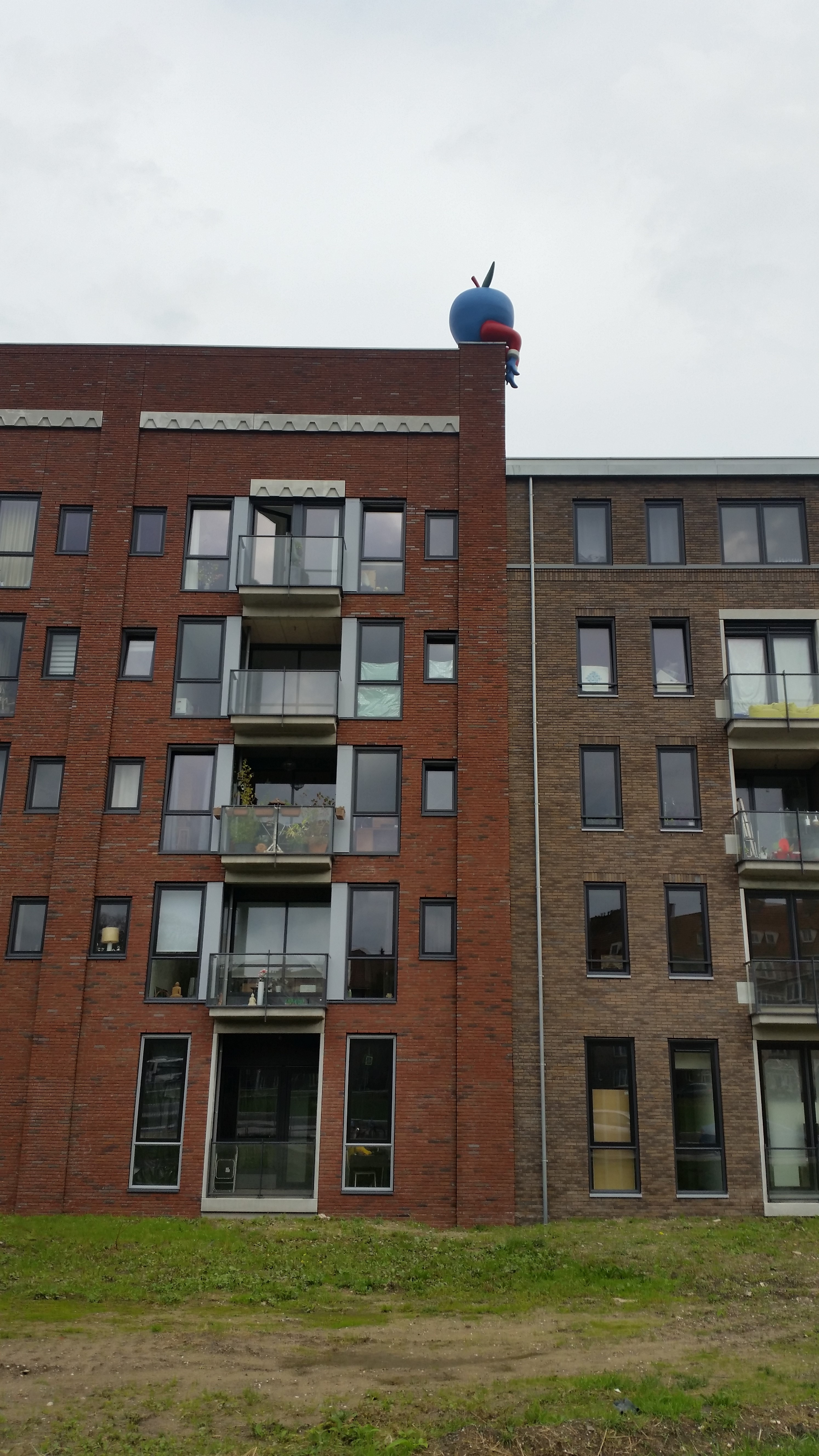 Driedelig beeld (2018) van Piet Parra voor De spreeuwen in Houthavens, Amsterdam-West